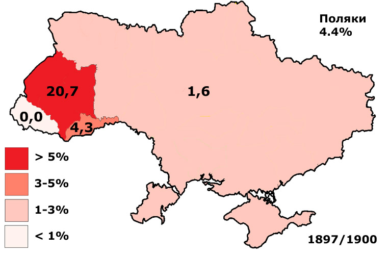 Поляки в Україні 1900: мапа